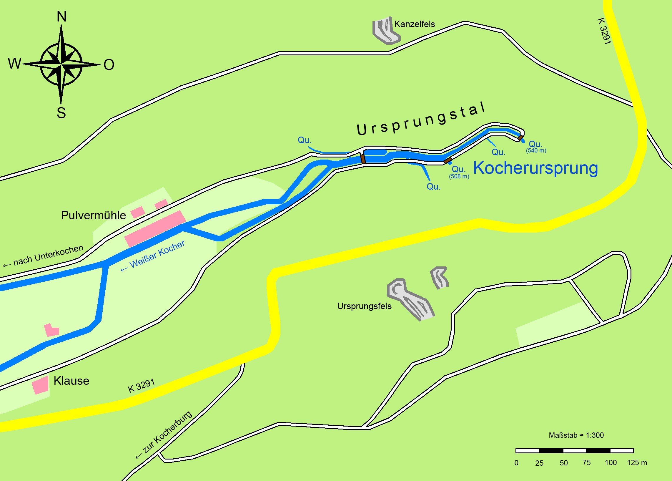 Karte des Kocherursprungs (Weißer Kocher) bei Aalen-Unterkochen, Baden-Württemberg Siedlungsfläche Wald Grünfläche Felsen Kreisstraße Brücke Gewässer Qu. Quelle